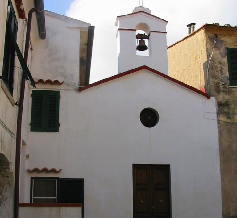 elba island